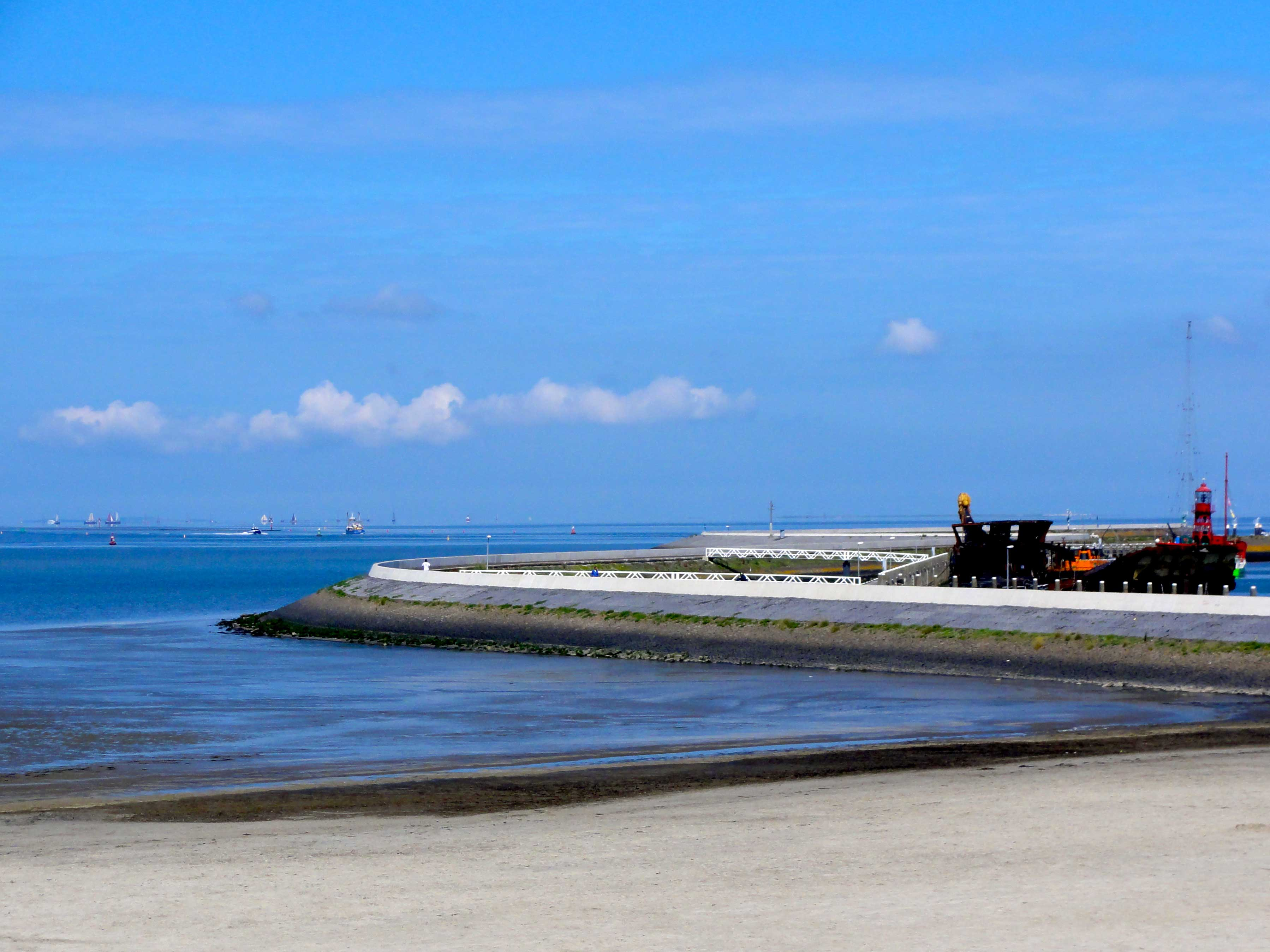 Havenmond Harlingen